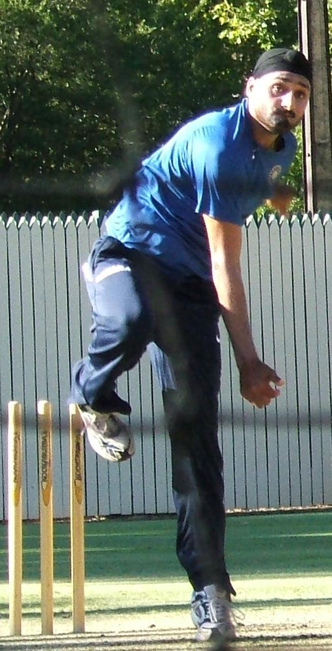 Harbhajan Singh at Adelaide Oval